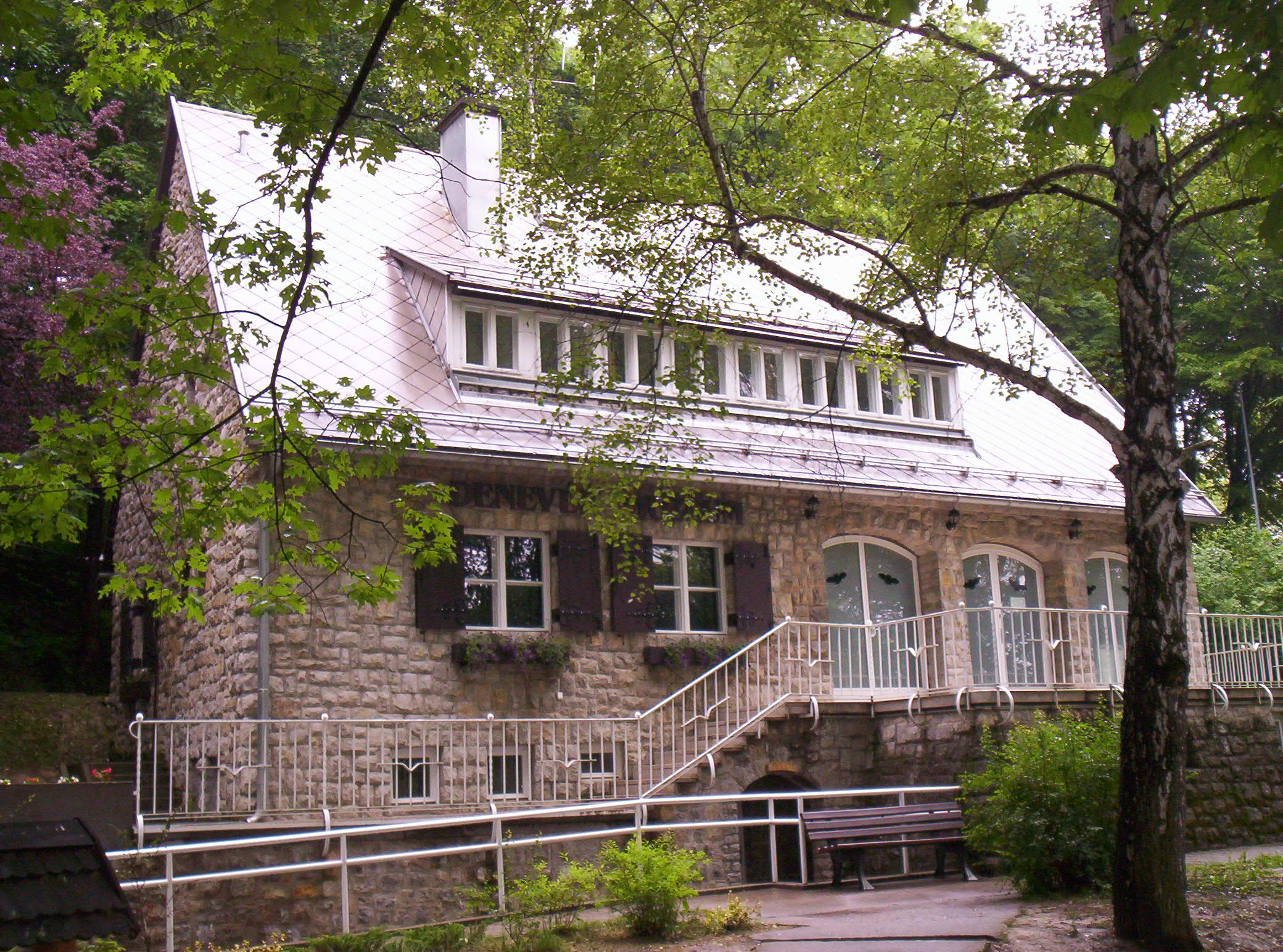 Az abaligeti Denevérmúzeum – photo taken by uploader User:Csanády in 2006.